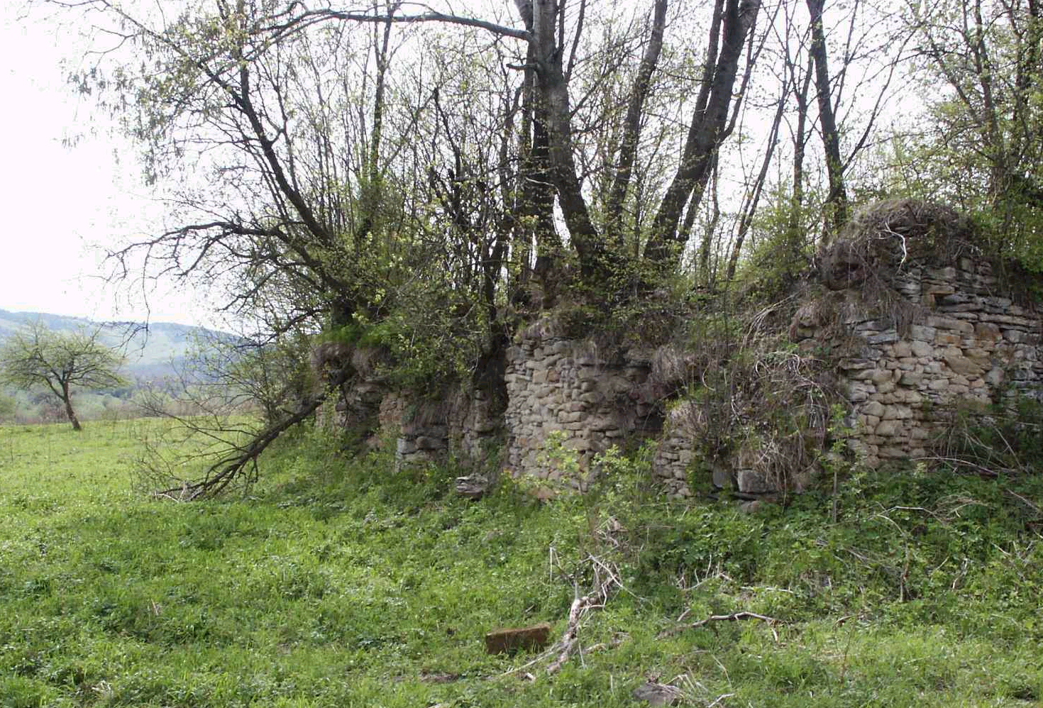 ruiny dworu obronnego w Plonnej , fotograf Marek Silarski, calkowitemu zniszczeniu dwór ulegl w 1946 w wyniku podpalenia przez UPA